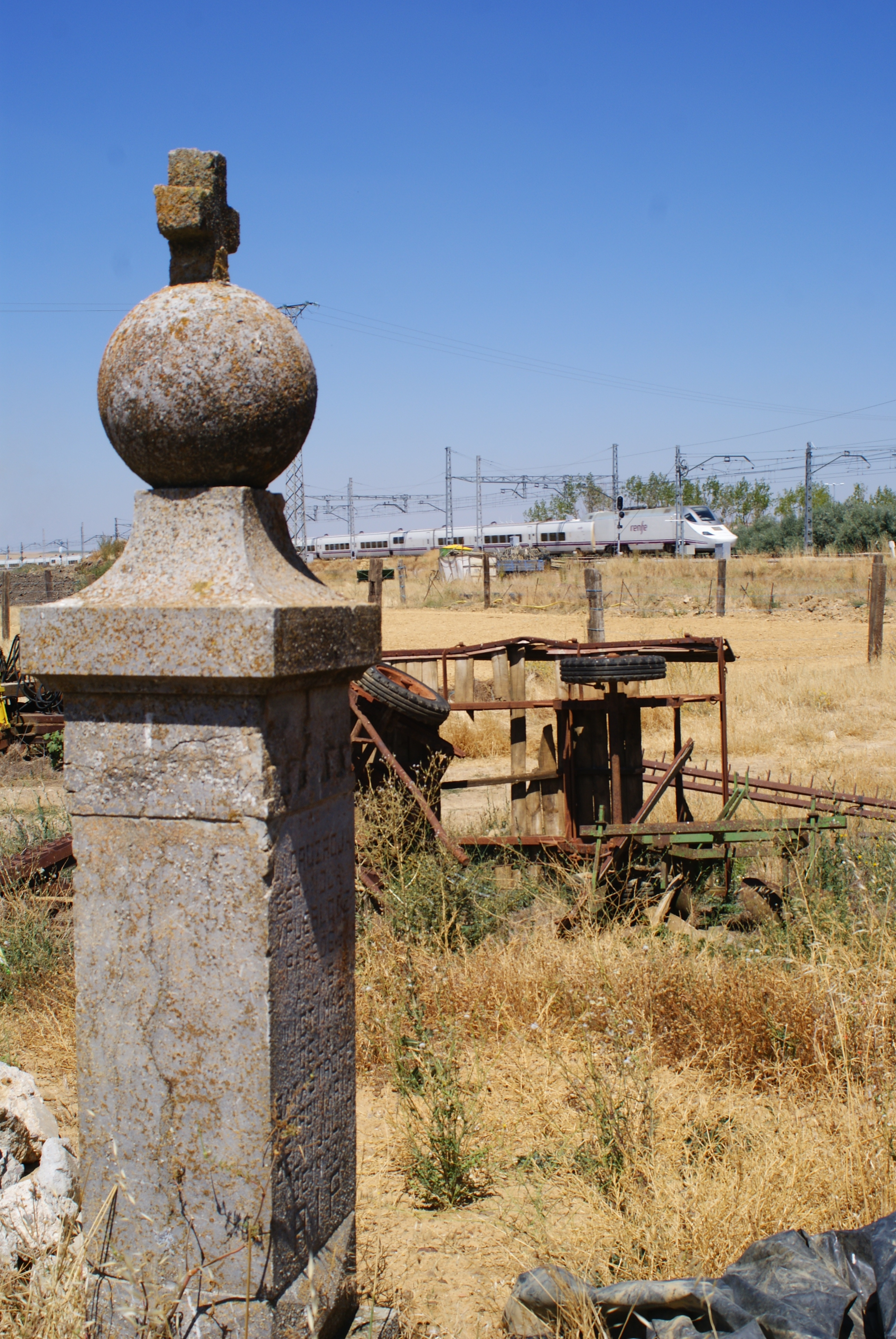 Monolito en memoria de los fallecidos en el accidente ferroviario del 11 de julio de 1922 en Paredes de Nava (provincia de Palencia, España)